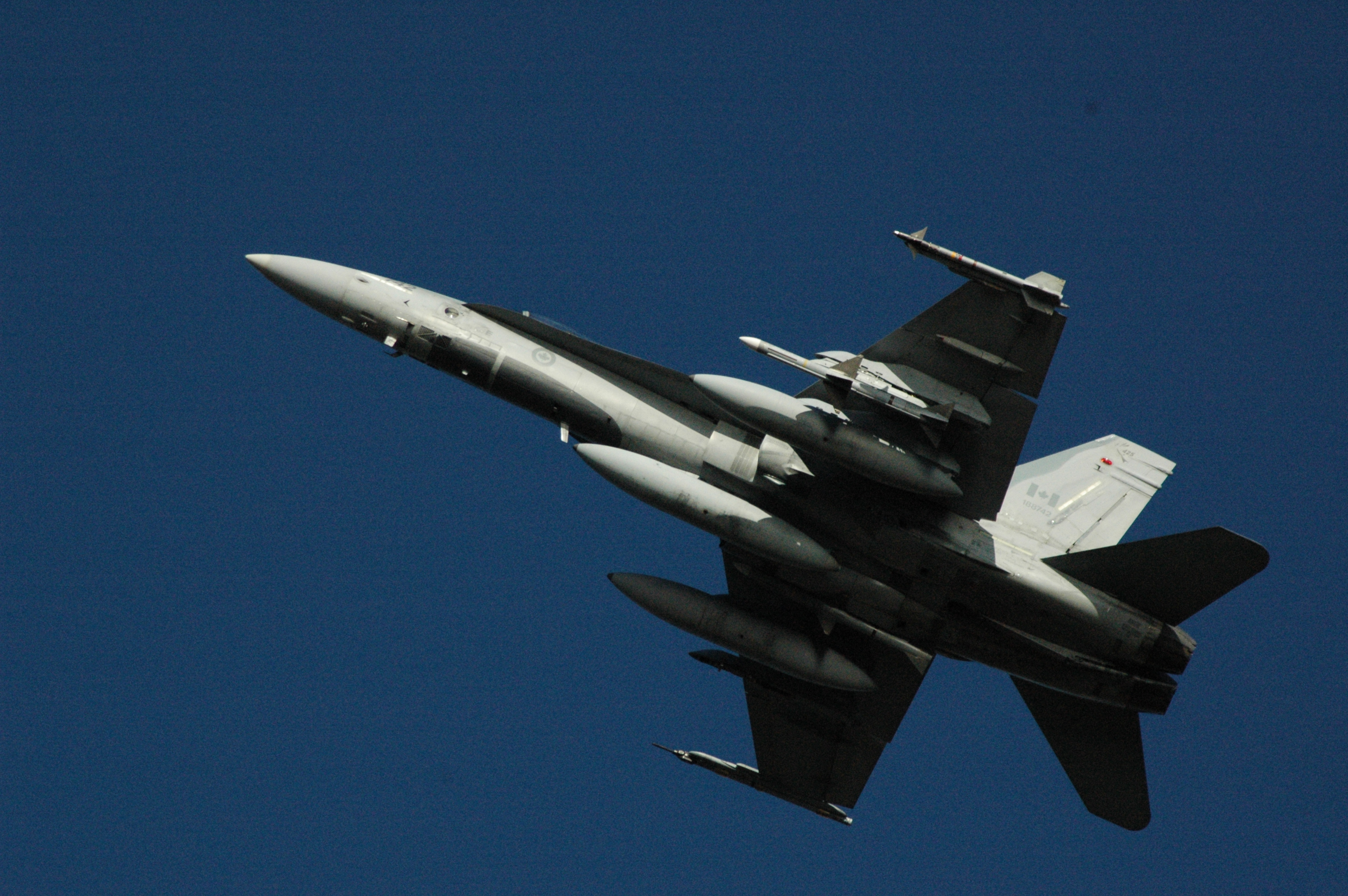 21-28 Nov 10 021